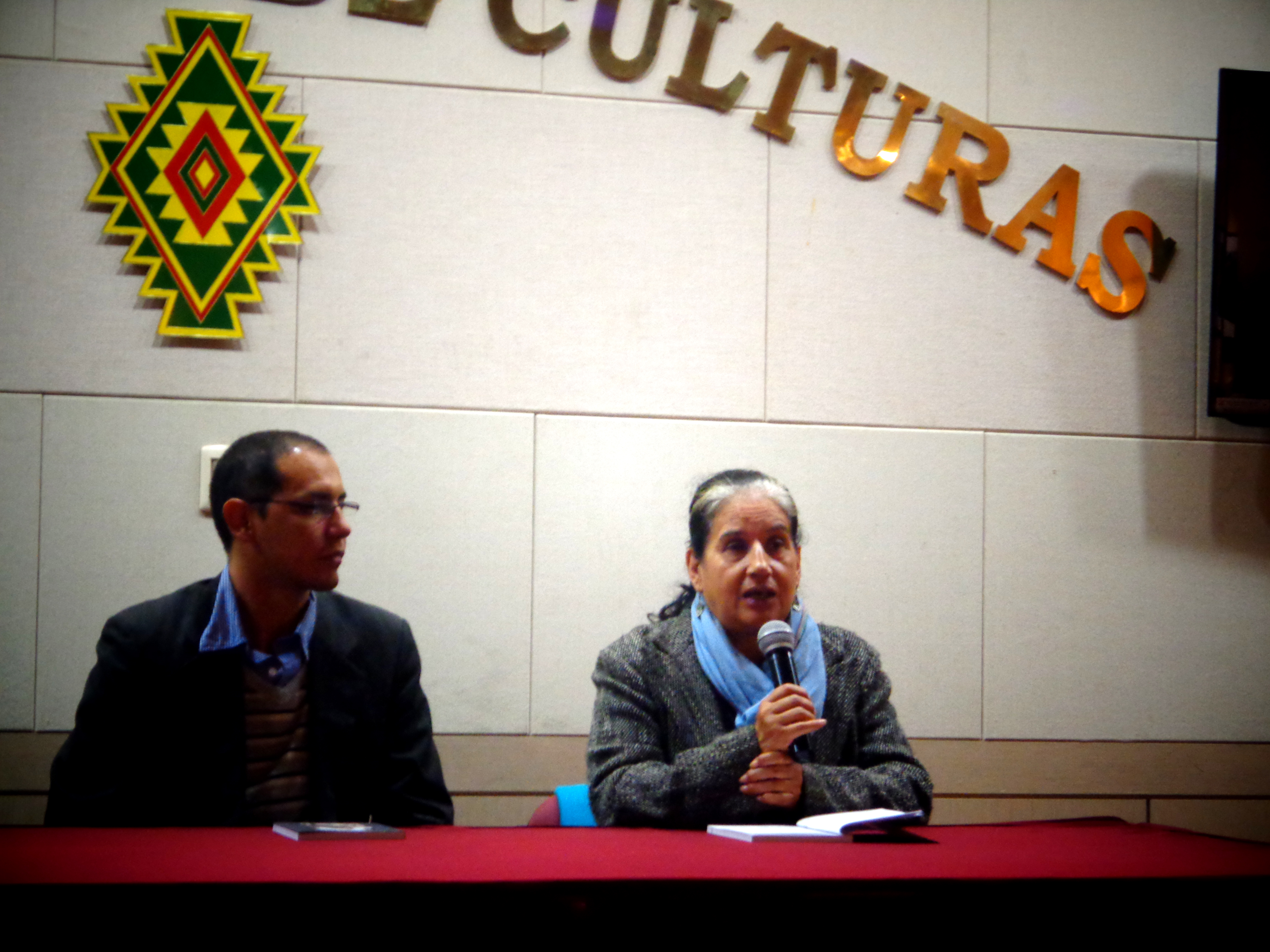 Edson Hurtado y Lupe Cajías